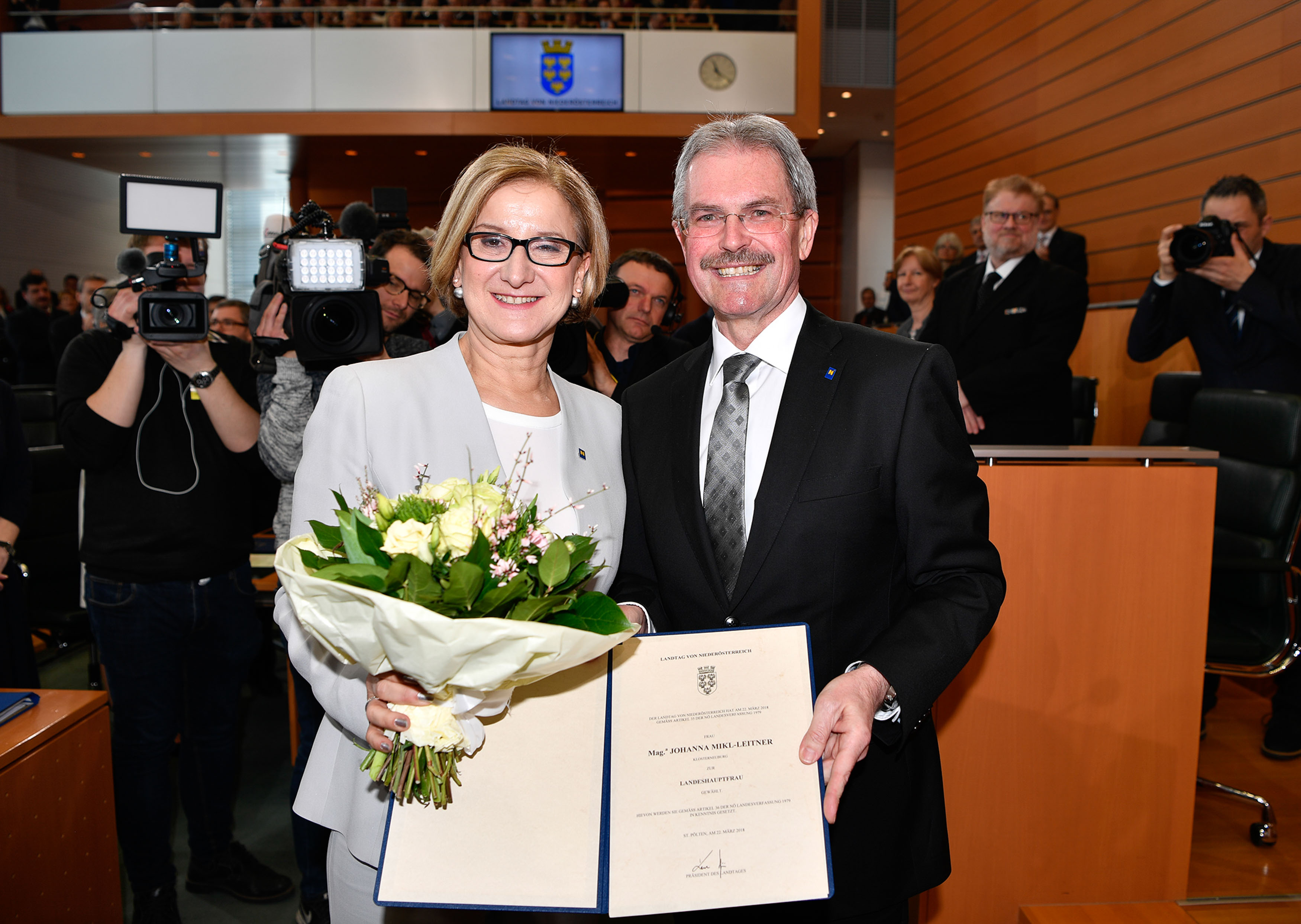 Am 22. März 2018 konstituierte sich der NÖ Landtag neu. Karl Wilfing wurde von den 56 Abgeordneten einstimmig als neuer Präsident des Landtages gewählt.